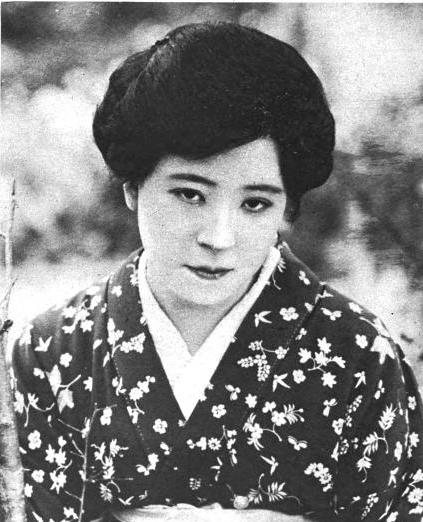 繪島千歌子、1925年の写真